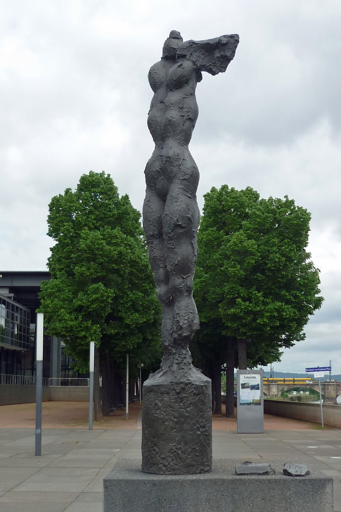 Nike '89, Sieg mit gebrochenen Flügeln (1997/1998) auf dem Bernhard-von Lindenau-Platz in Dresden